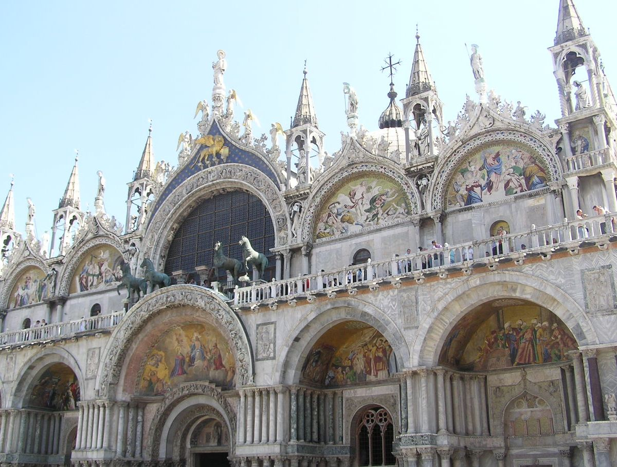 Basílica al atardecer St. Mark's Basilica in Venice, Italy This picture was taken by me (Filip Maljkovic) on July 4th, 2004 at 11:39, when I was in Venice on a tourist trip.